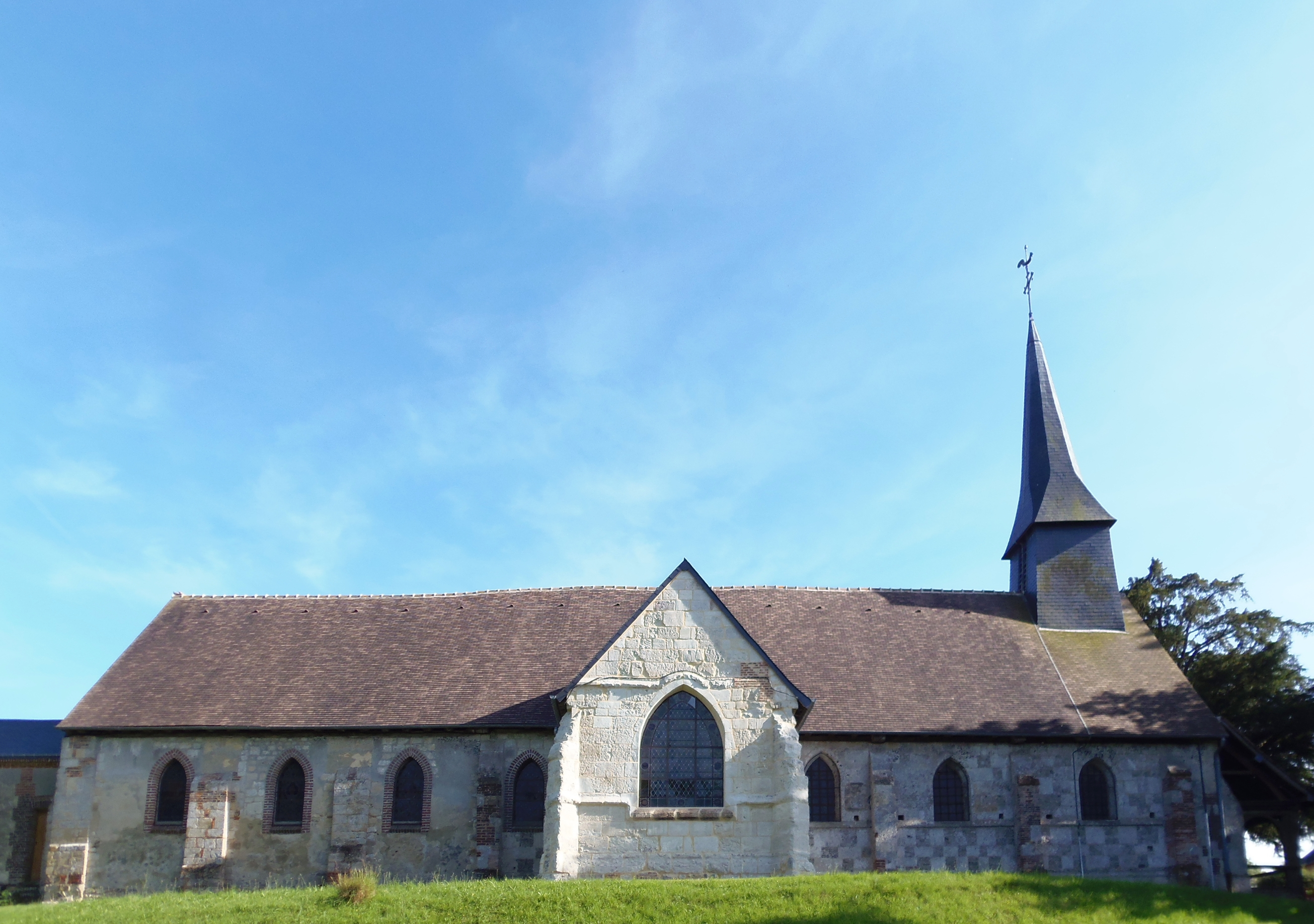 Norolles (Normandie, France). L'église Saint-Denis.